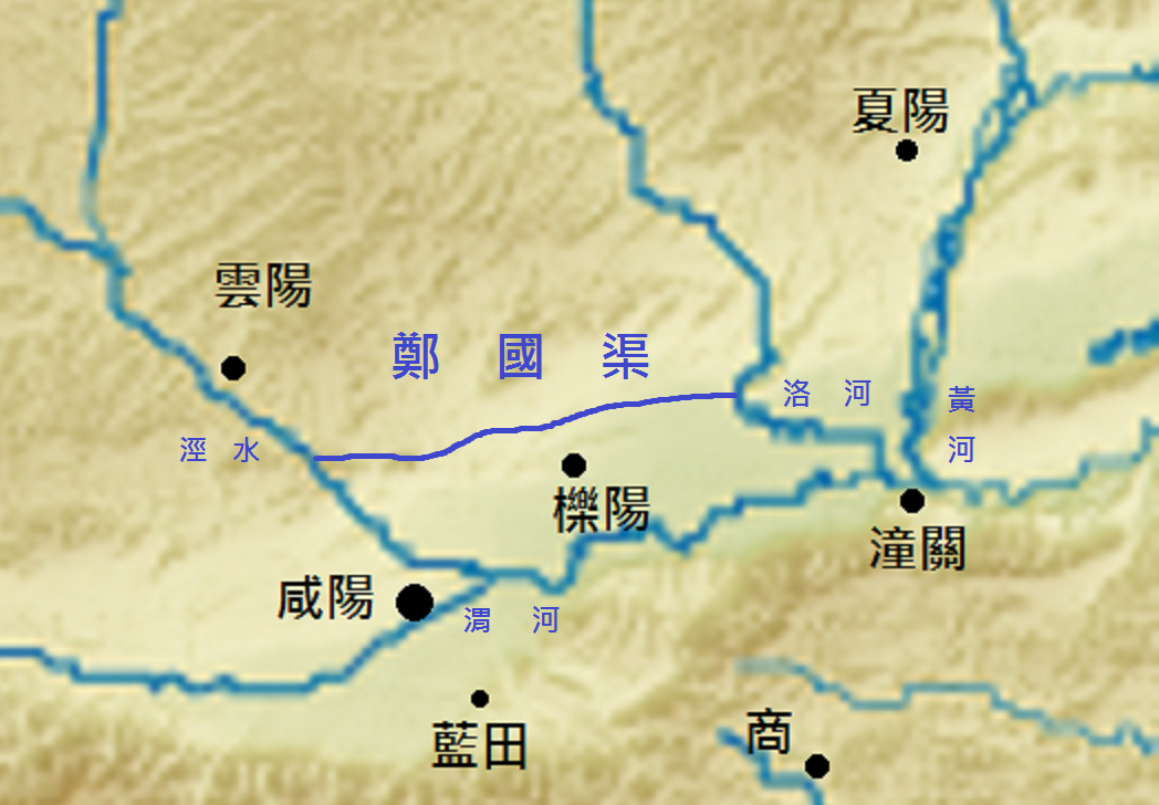 秦朝鄭國渠狀態圖